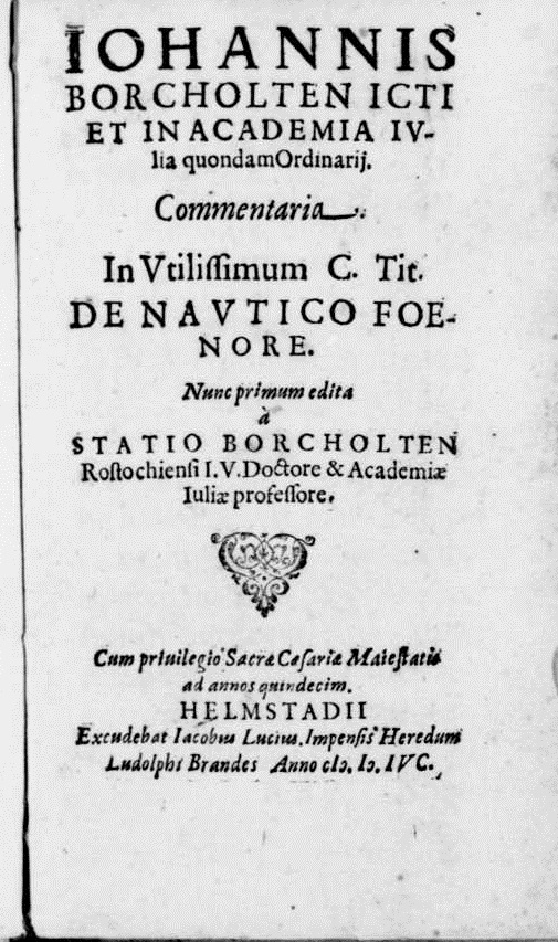 Frontespizio